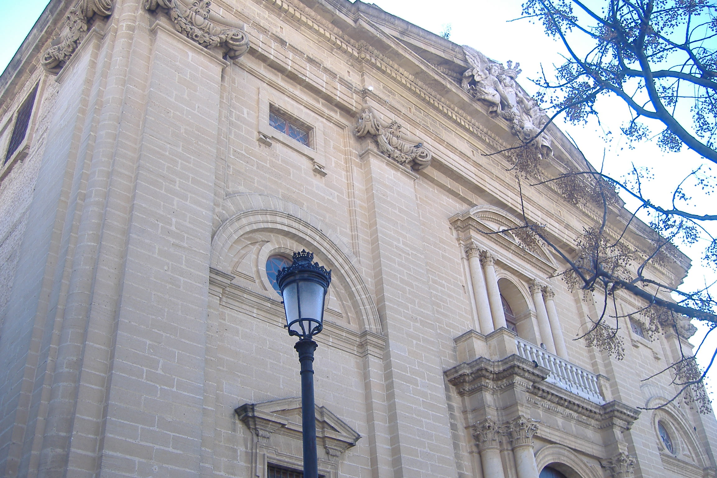 Vista exterior de la Iglesia de San juan Bautista de Chiclana de la Fra.